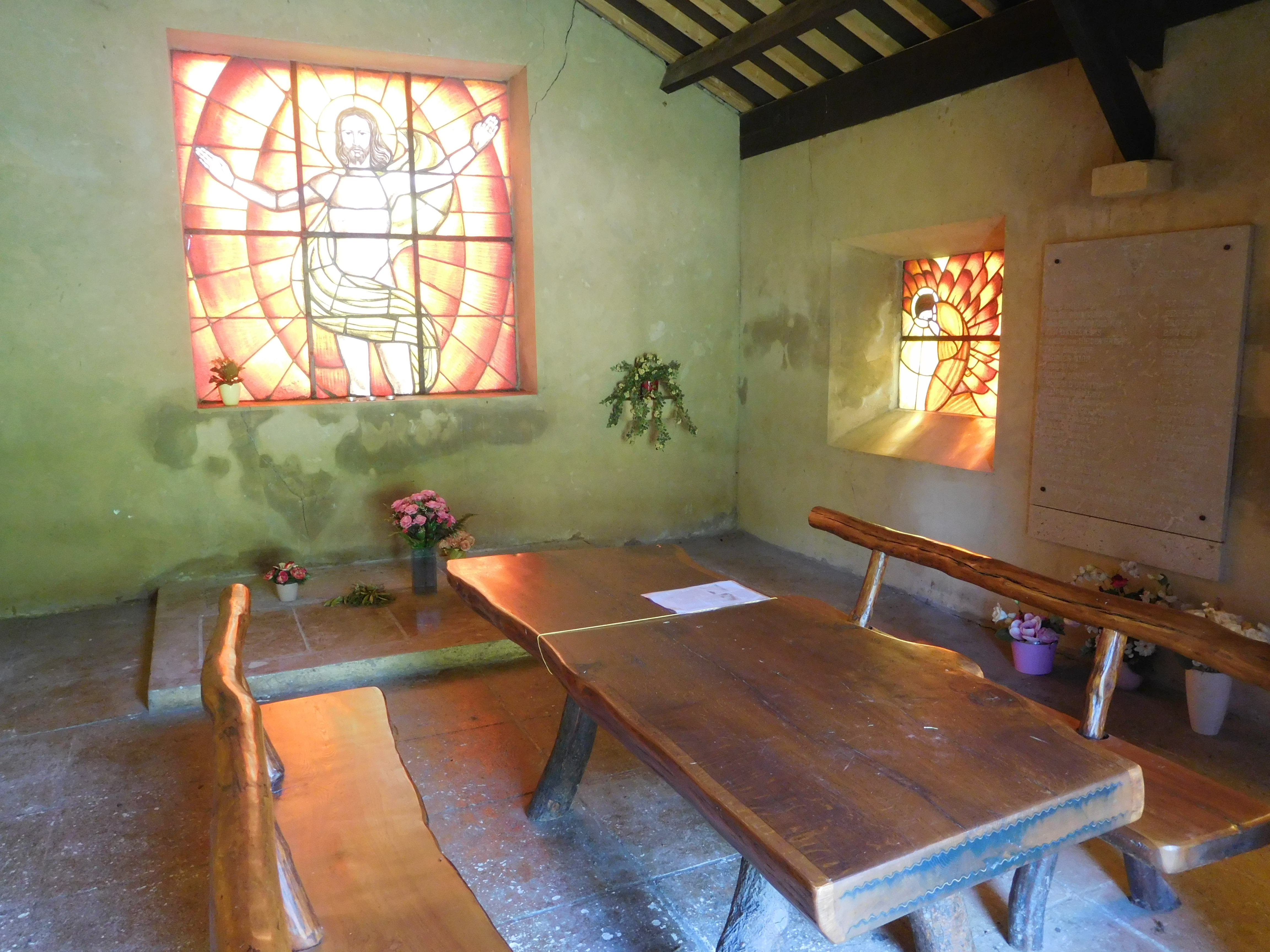 In térieurde la chapelle du Flachis, entre Orchimont et Conrad (Belgique)